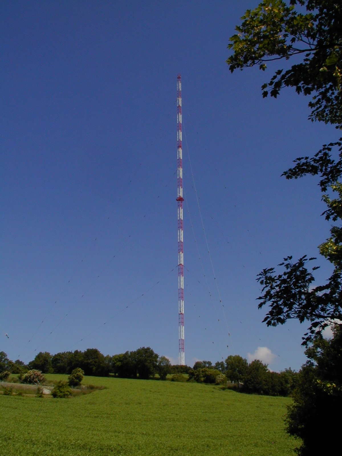 Sendeanlage Bisamberg bei Wien. Nordmast (260m.).